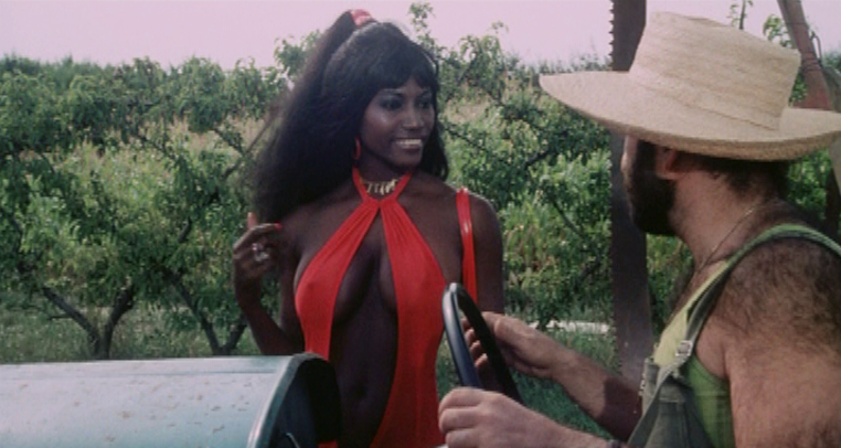 scena dal film La mazurka del barone, della santa e del fico fiorone